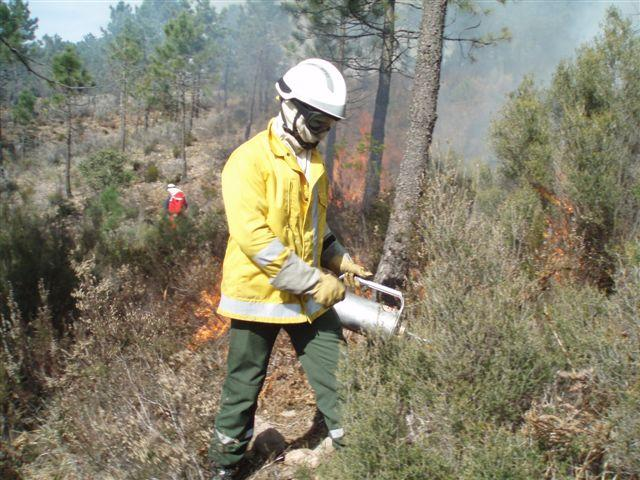 Brûlage dirigé en forêt domaniale de l'Estérel conduit par les personnels APFM de l'Office national de forêts en 2010.